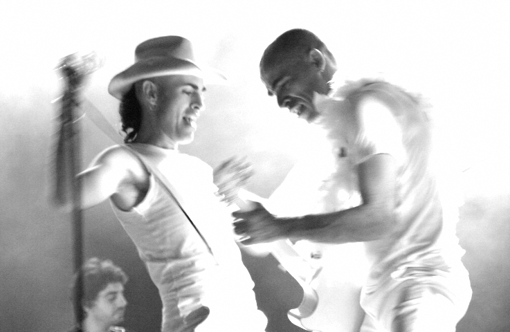 Plaza Noites Ritual Rock 2005 - 14ª edição - Portugal - Porto - Palácio de Cristal - Foto de J.P.Casainho